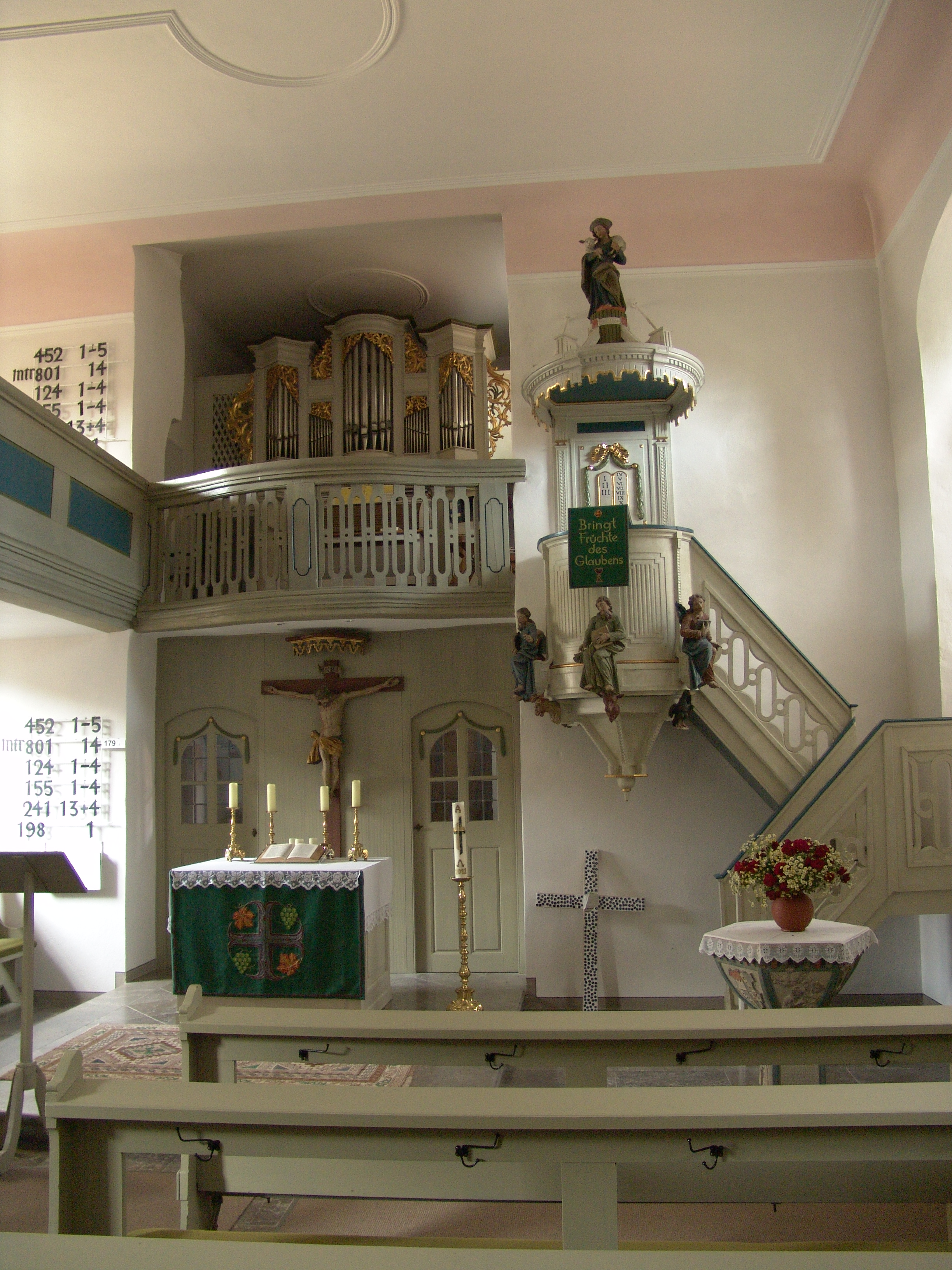 Neuses am Berg St. Nicolai